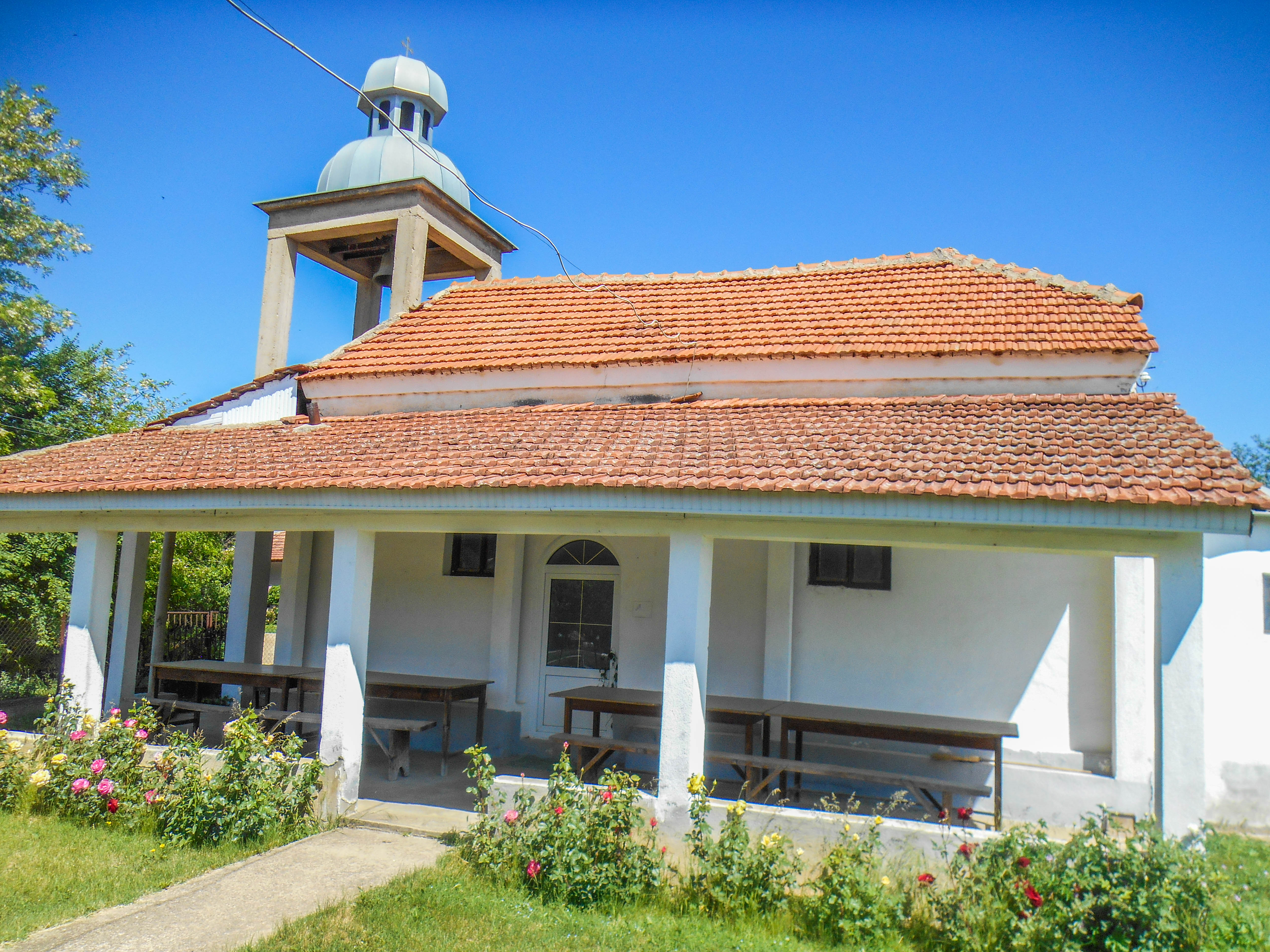 Црква „Св. Јован Златоуст“ - Ангелци